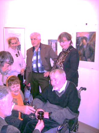 Марковський І.Ф. в колі друзів на презентації виставки